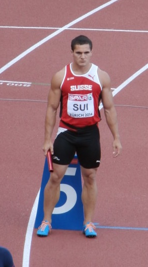 Pascal Mancini aux Championnats d'Europe d'athlétisme de 2014.